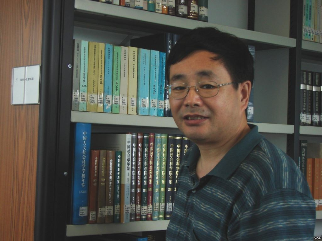 陈子明（美国之音海涛拍摄）